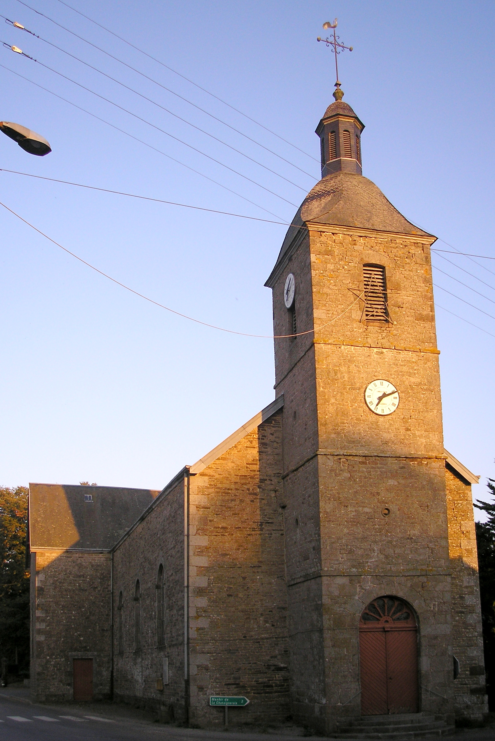 Saint-Siméon (Normandie, France). L'église Saint-Siméon.